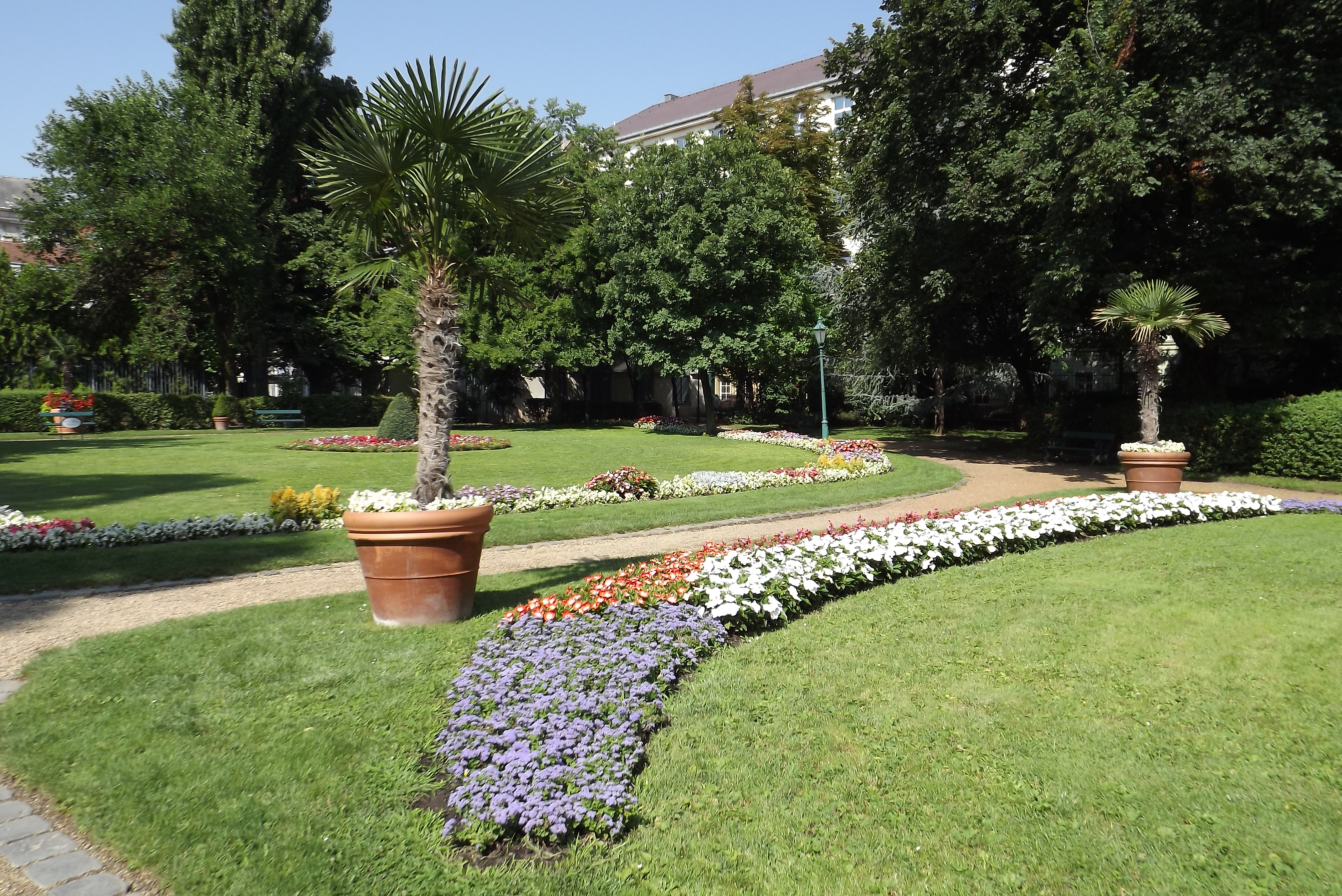 A budapesti Károlyi-kert 2014 augusztusában (Budapest, V. ker.)